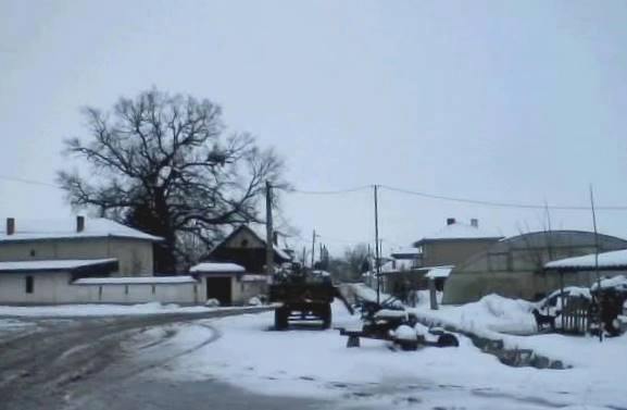 Големият вековен дъб от с. Градина, Пловдивска област, Първомайска община